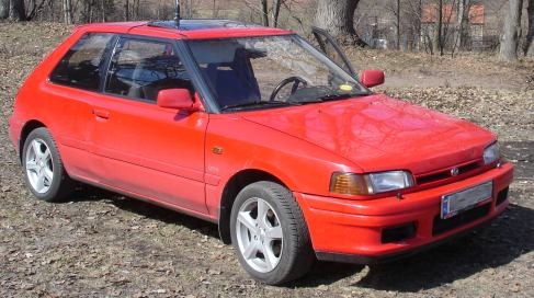 Mazda 323 GTX Rok produkcji: 1990 Pojemność: 1840 cm3 Moc: 122kW